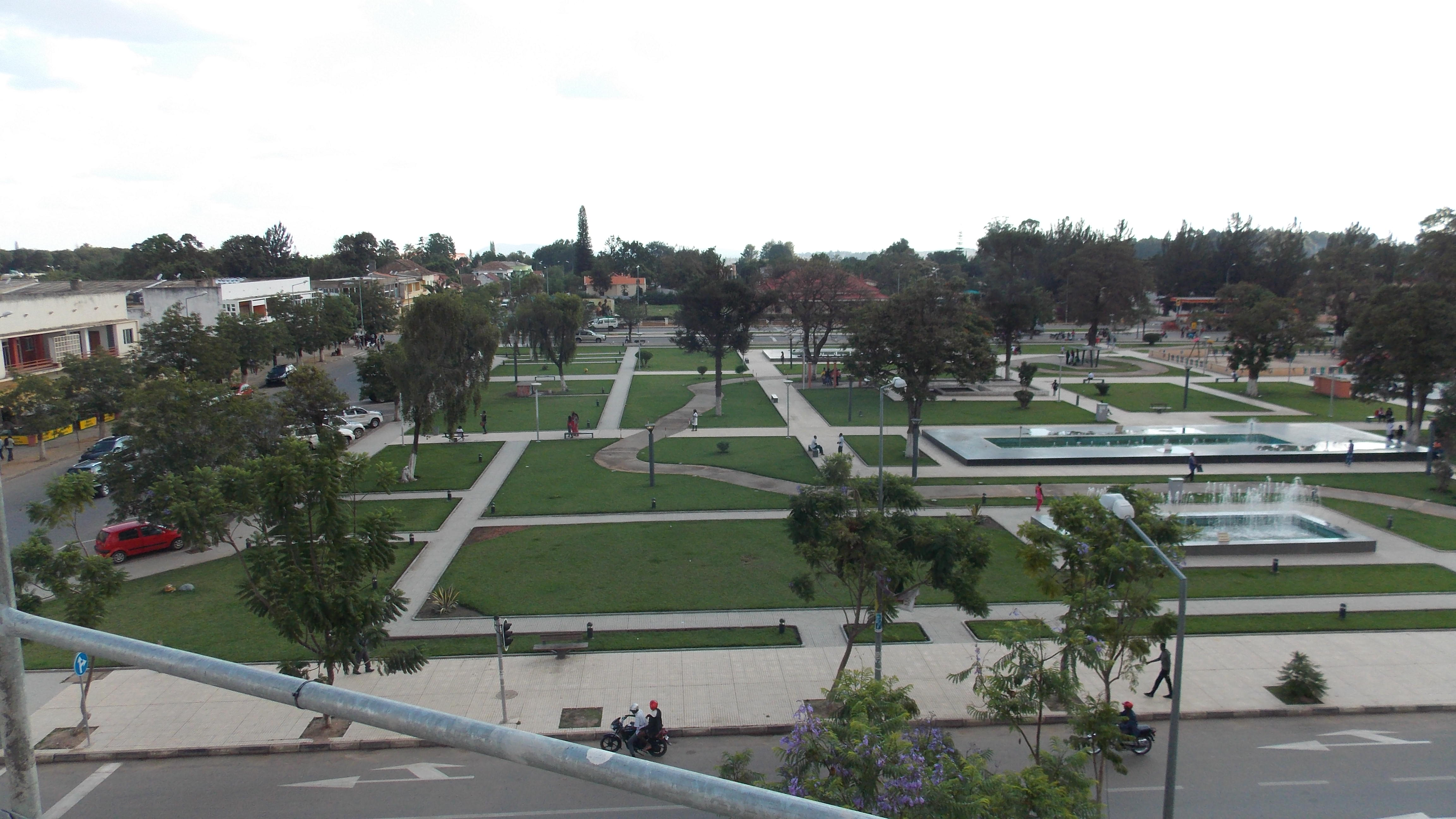 Jardim da Cultura, Cidade Alta, Huambo, Angola